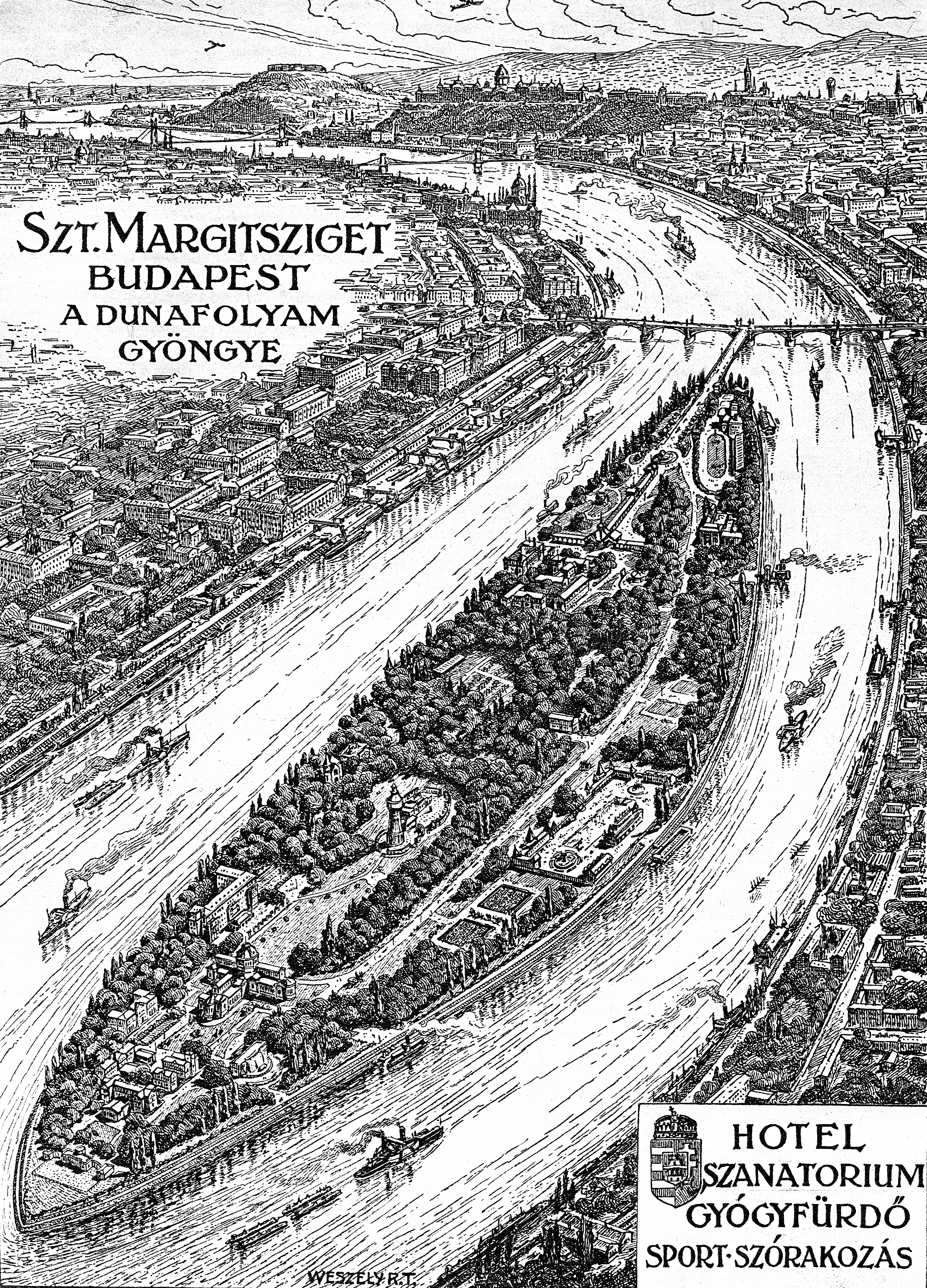 Szt. Margit-sziget 1928-ban - vetületi rajz